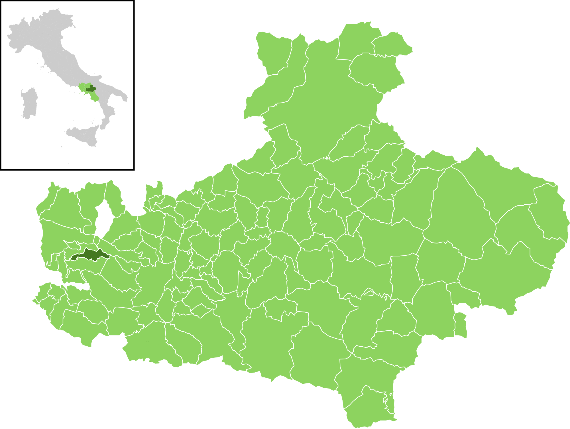 Posizione del comune all'interno della provincia di Avellino